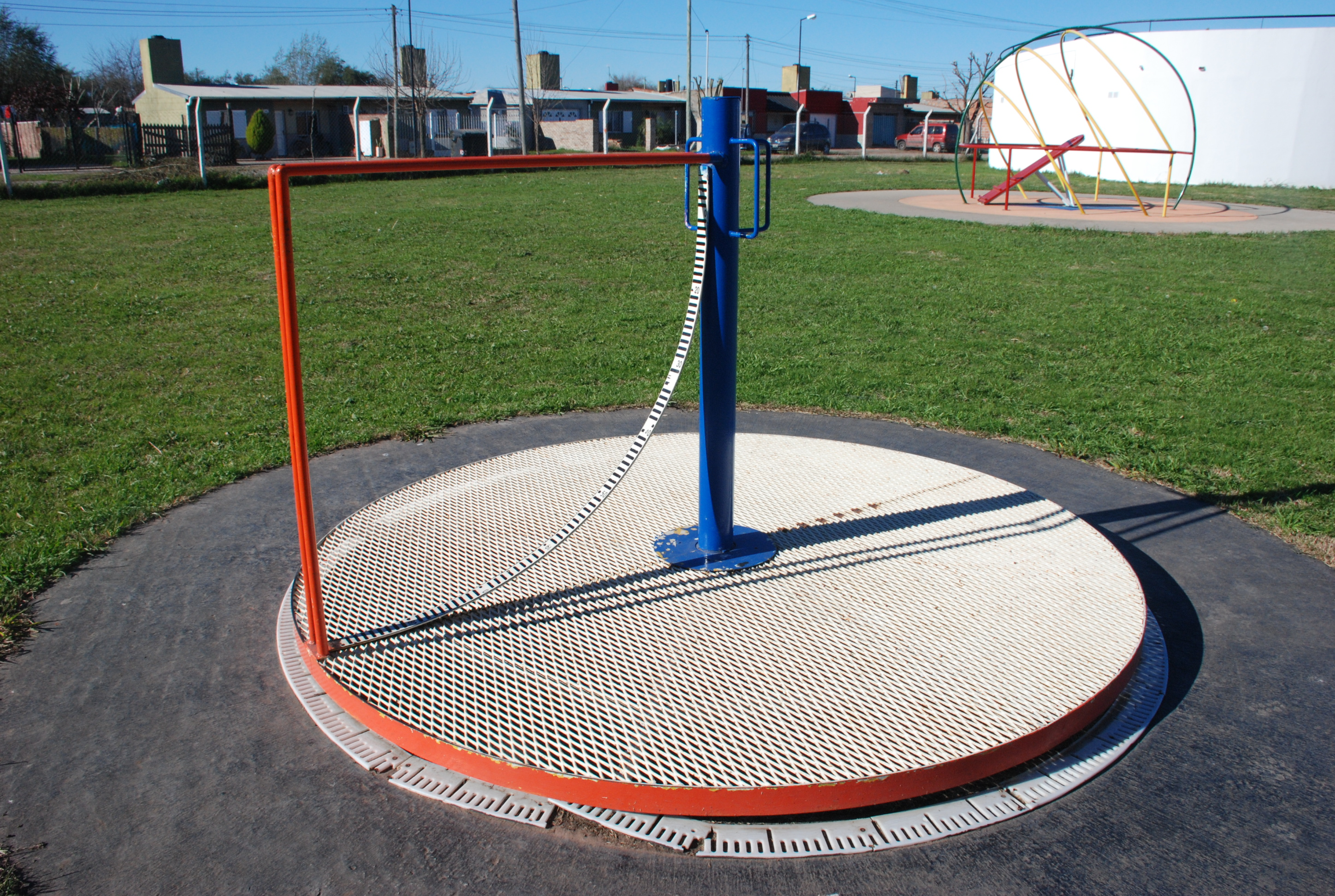 El Plintio móvil del Parque Cielos del Sur, Chivilcoy, provincia de Buenos Aires.